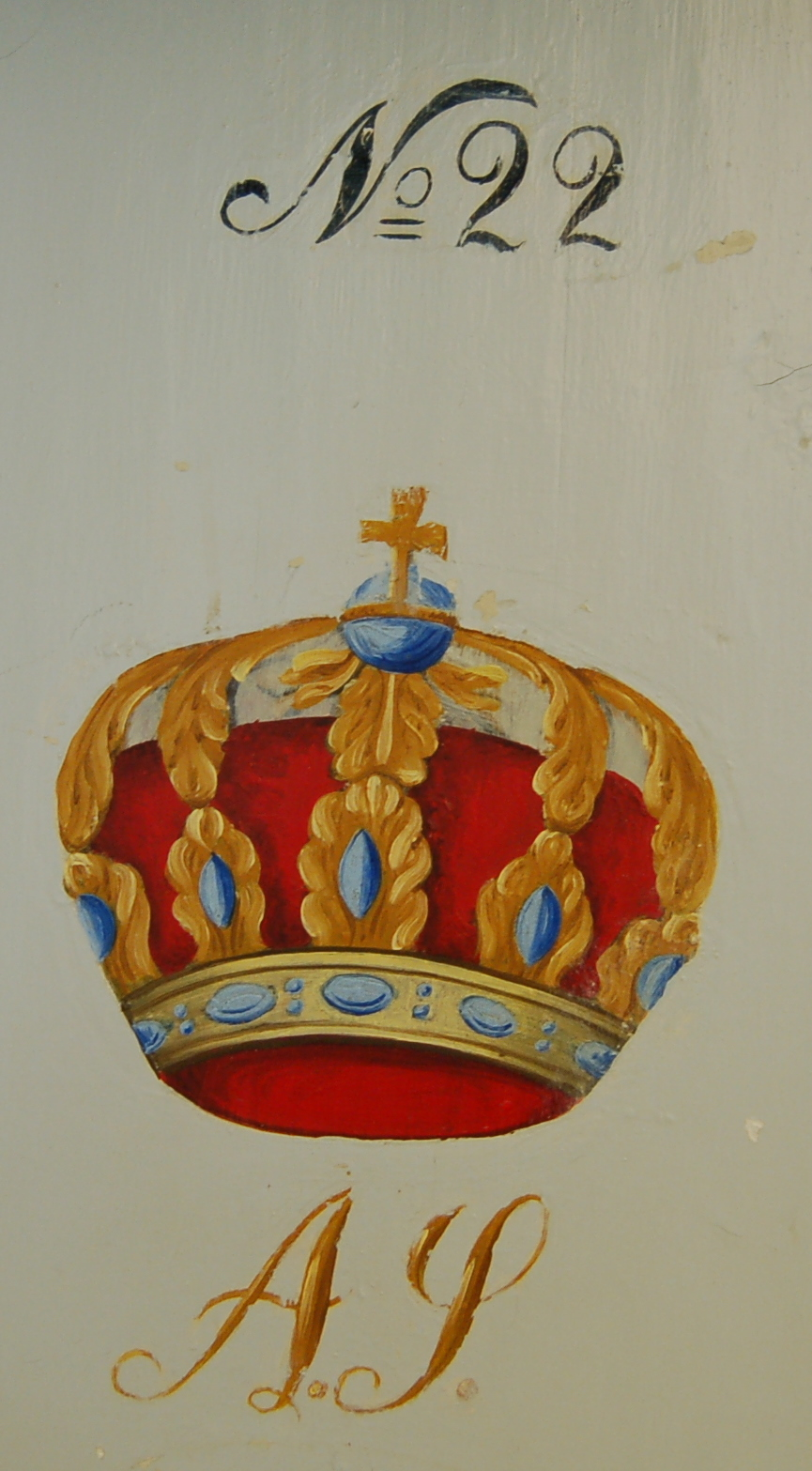 Enkedronning Anna Sophies initialer i Hospitalet